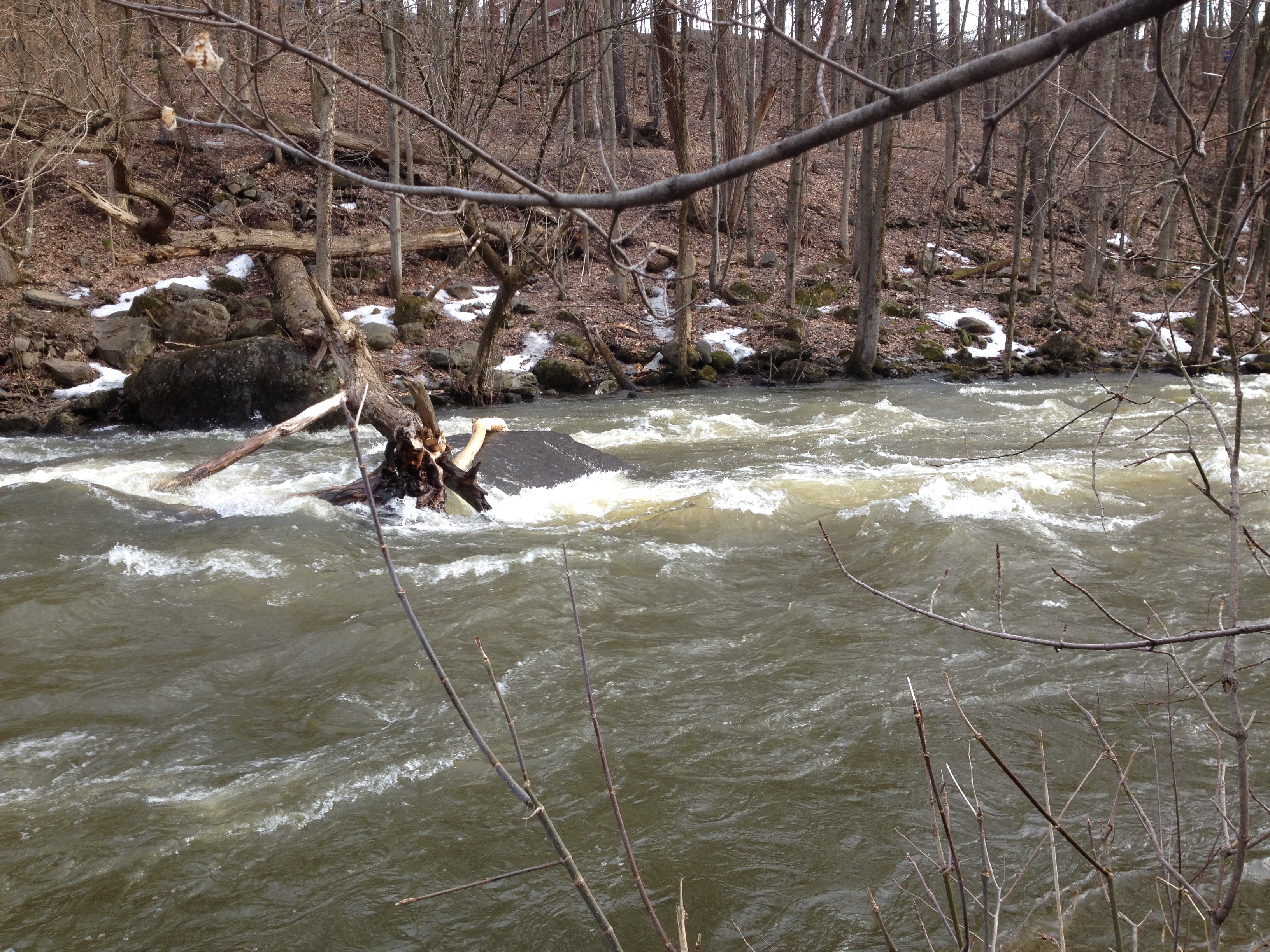 La rivière Yamaska à Granby après la fonte de la neige.